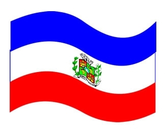 Bandeira da cidade de Monte Aprazível, SP